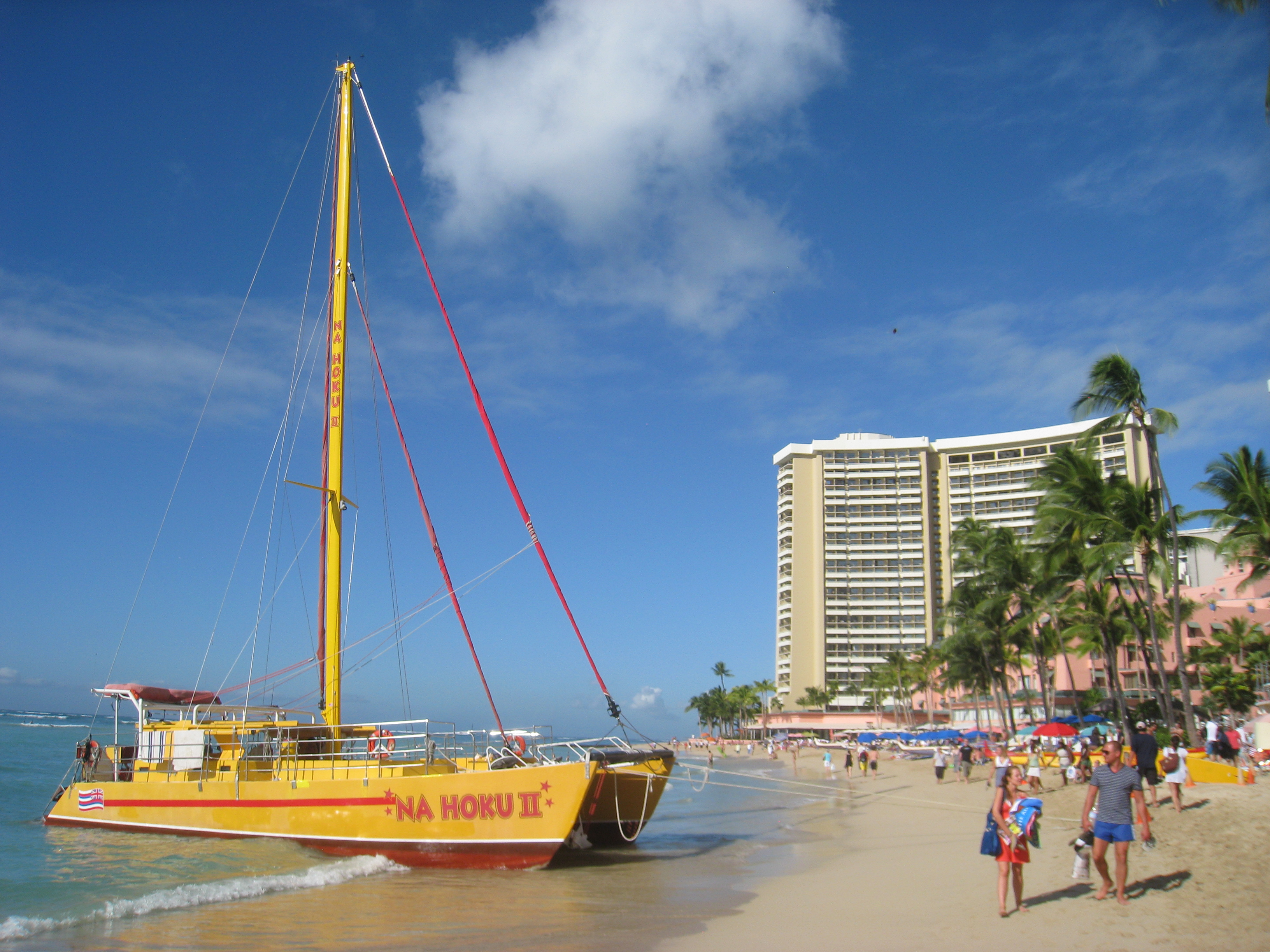 Waikiki Beach, Honolulu, Hawaii, USA.